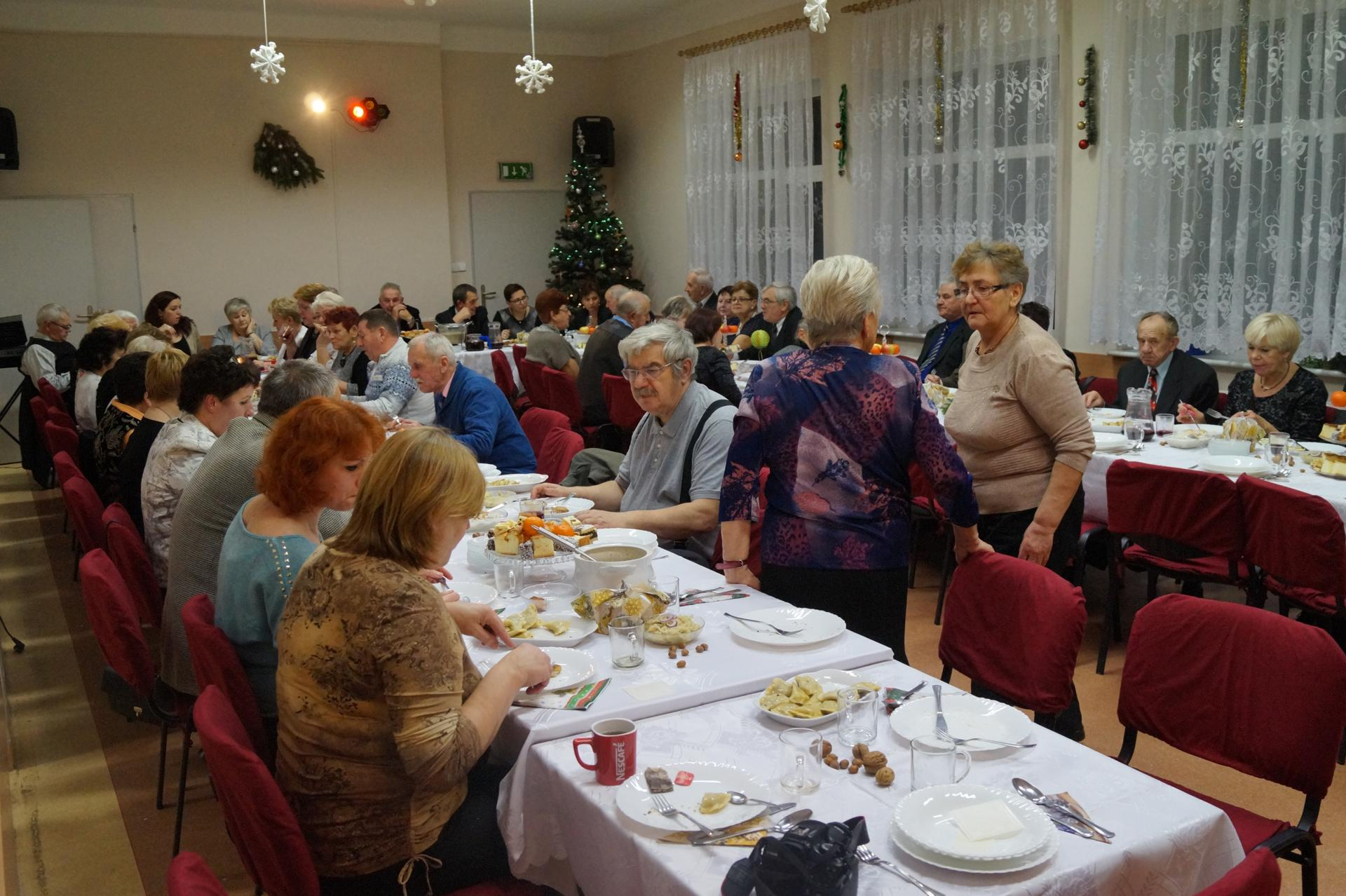 Spotkanie opłatkowe seniorów (Wojcieszyce, grudzień 2015r.)